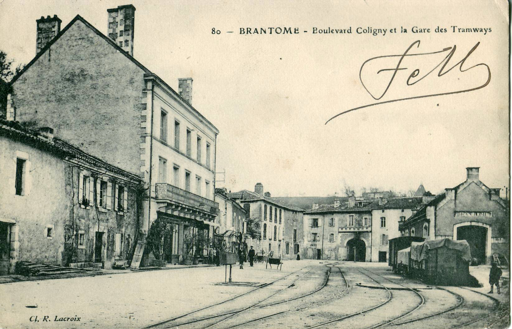 Carte postale ancienne éditée par R. Lacroix : BRANTÔME - Boulevard Coligny et la Gare des Tramways